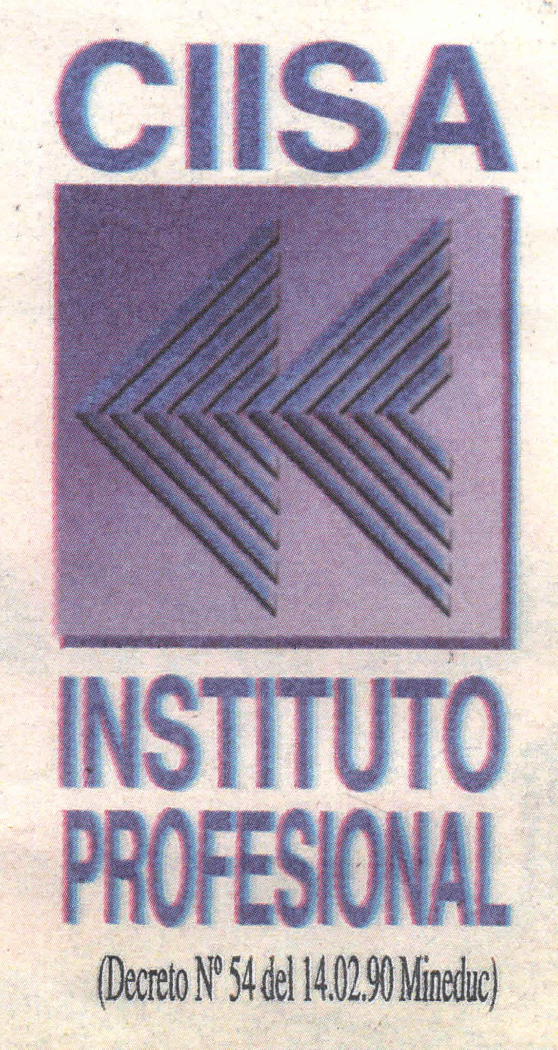 Logo CIISA de 1990.